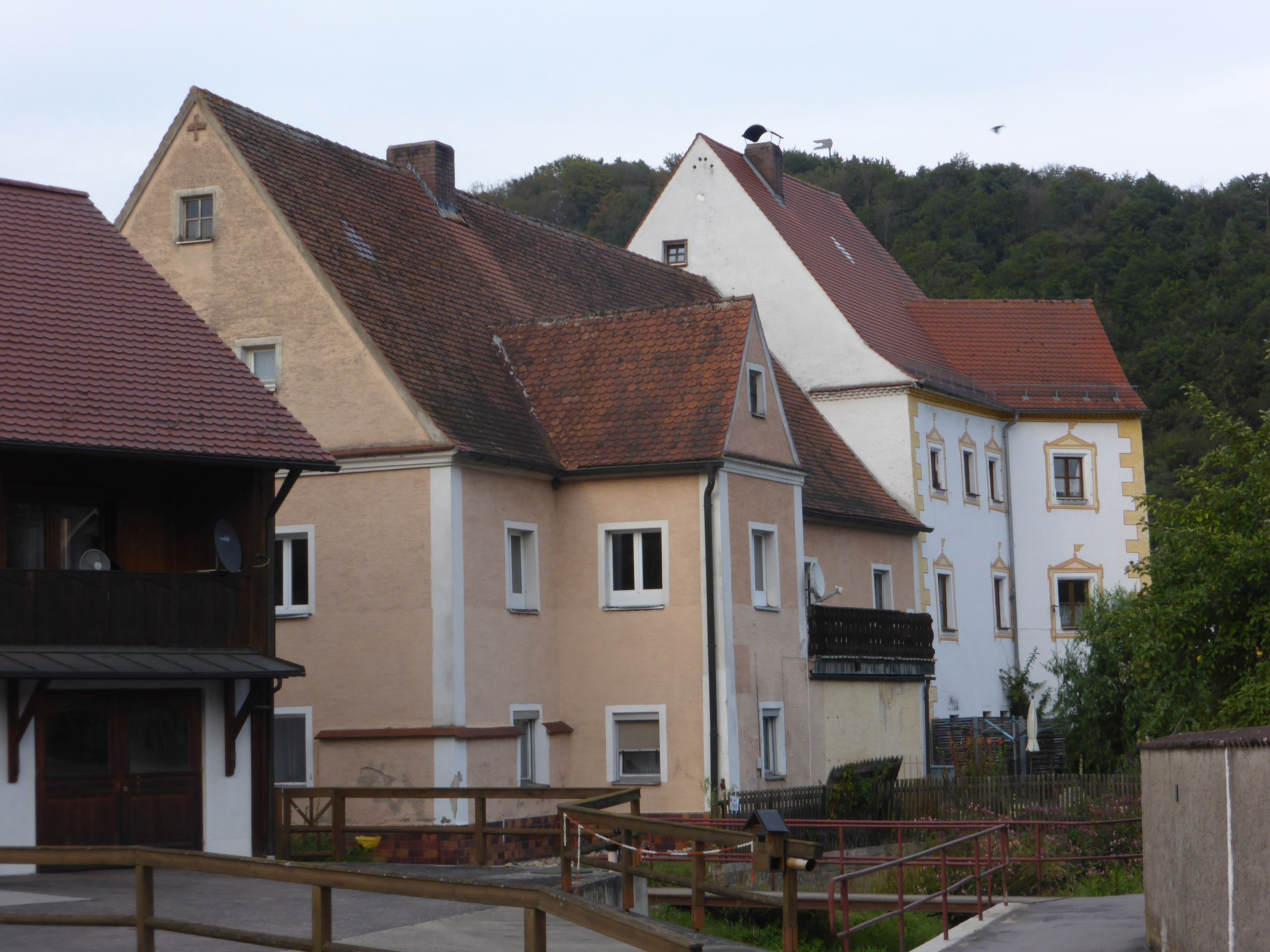 Schloss Rohrbach mit angebauter Schlossschänke